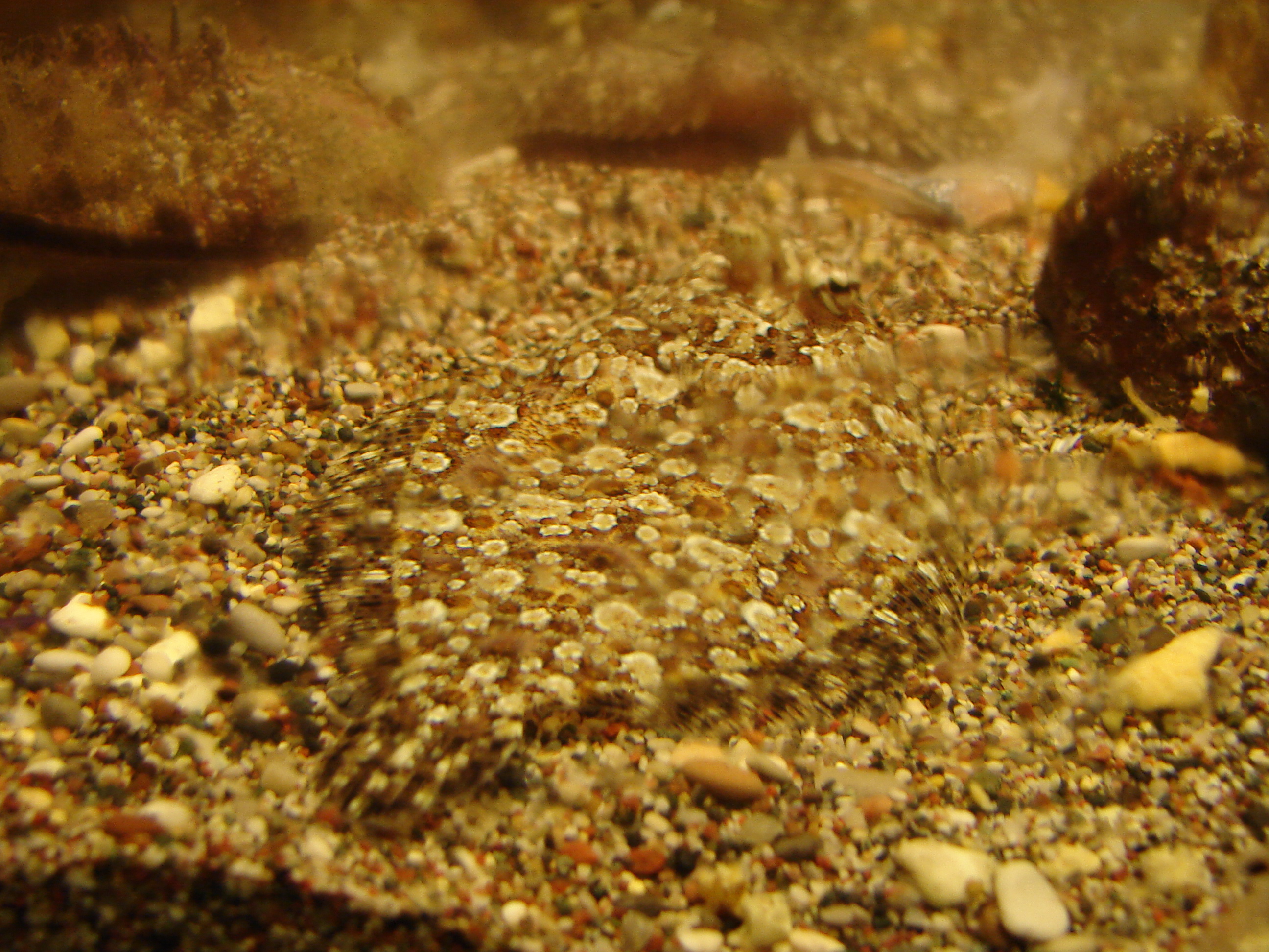 Plats Bothus podas. Aquarium de Rhodes